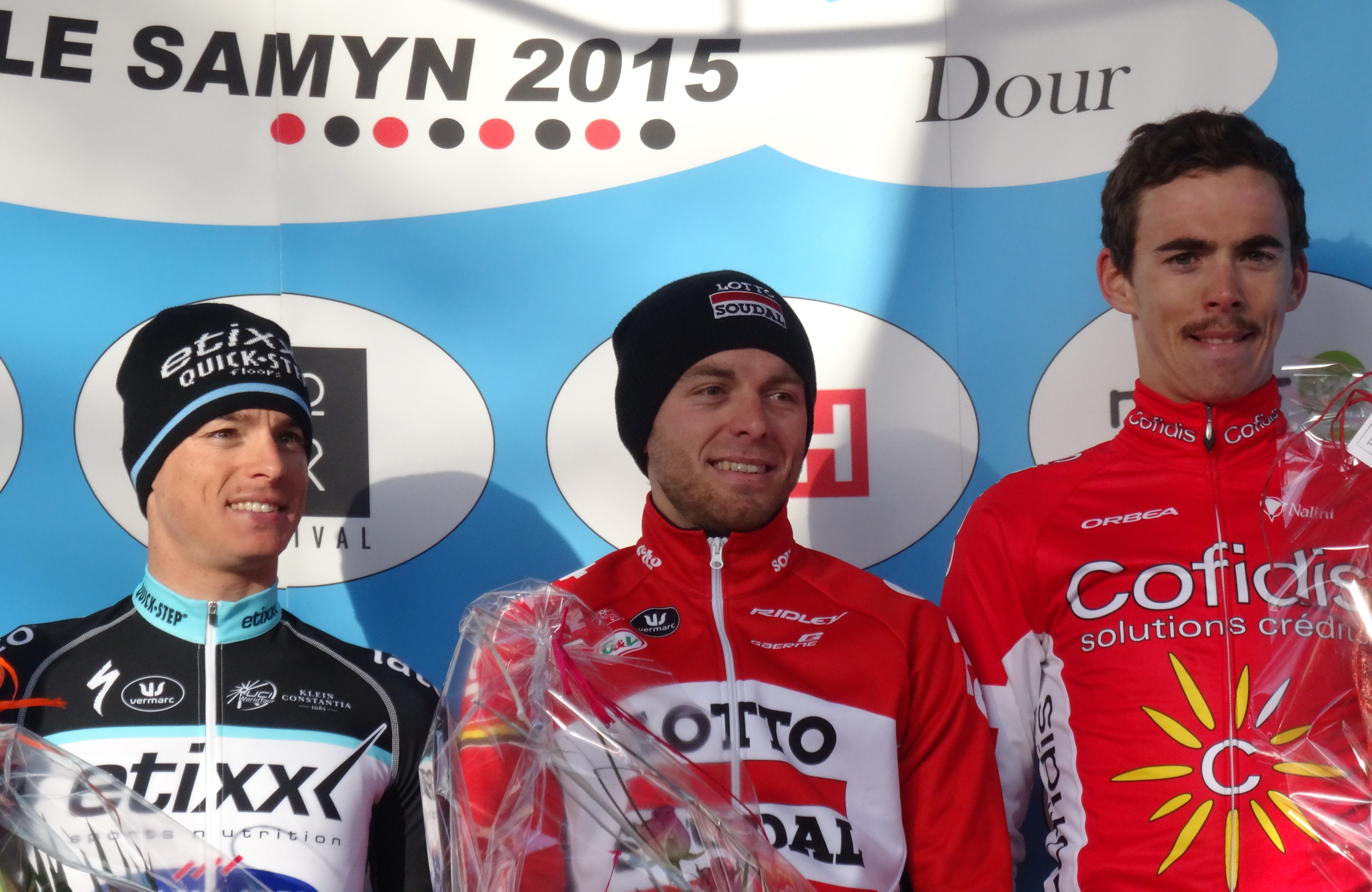 Reportage réalisé le mercredi 4 mars à l'occasion de l'arrivée du Samyn des Dames 2015 et du Samyn 2015 à Dour, Belgique.